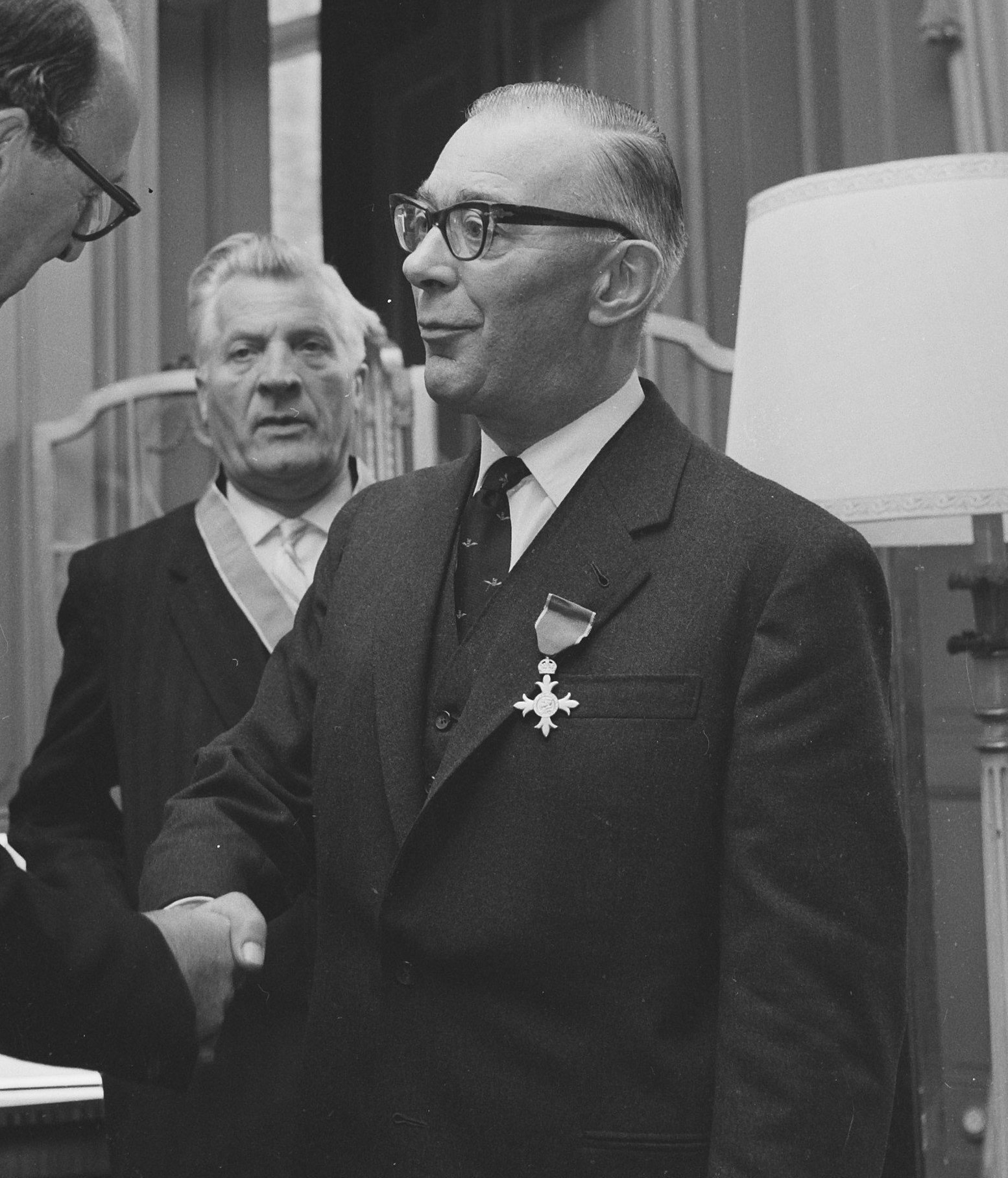 Collectie / Archief : Fotocollectie Anefo Reportage / Serie : [ onbekend ] Beschrijving : Britse Ambassadeur Sir Peter Garran reikte onderscheidingen uit Datum : 14 september 1965 Trefwoorden : ONDERSCHEIDINGEN, ambassadeurs Persoonsnaam : Garran, Peter Fotograaf : Kroon, Ron / Anefo Auteursrechthebbende : Nationaal Archief Materiaalsoort : Negatief (zwart/wit) Nummer archiefinventaris : bekijk toegang 2.24.01.03 Bestanddeelnummer : 918-1802